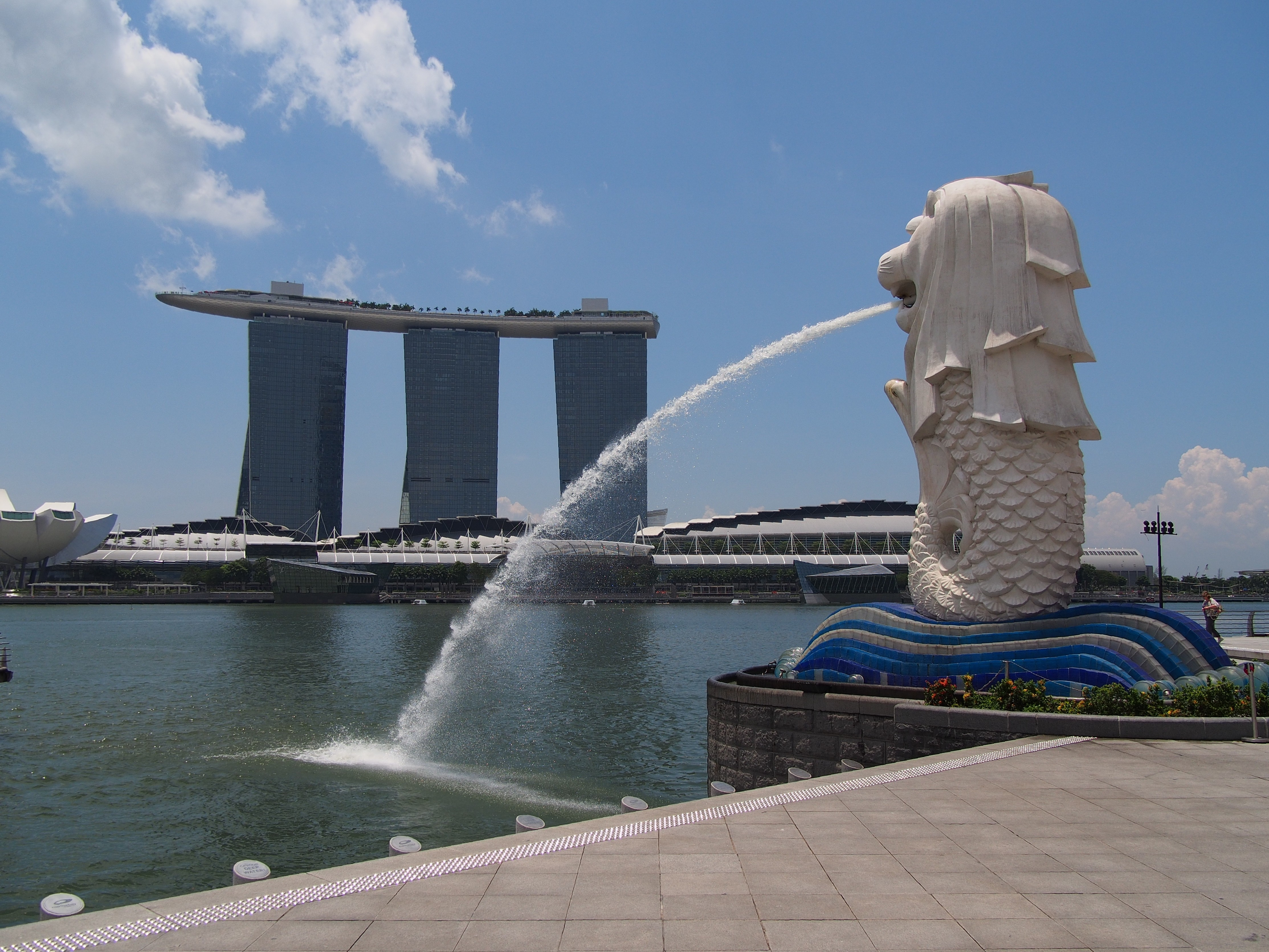 Merlion - 2013.04